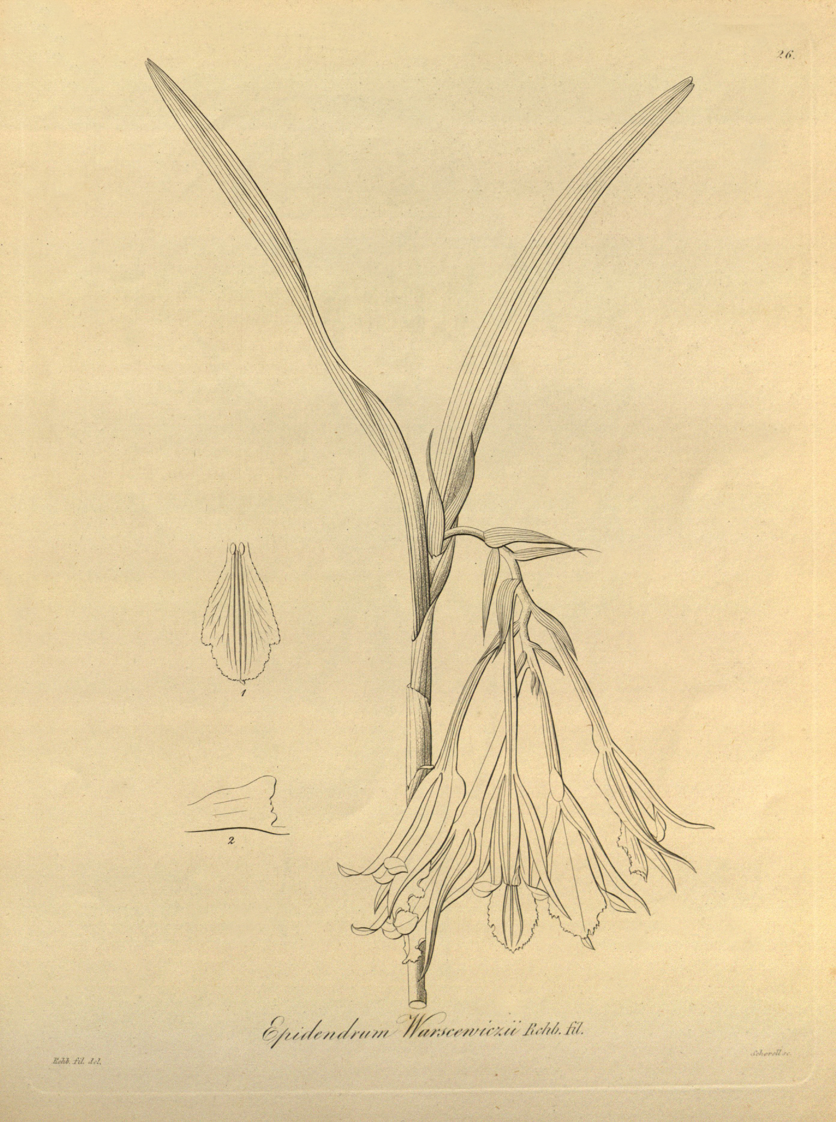 Illustration of Epidendrum warszewiczii (spelled by Reichenbach as Epidendrum warscewiczii)